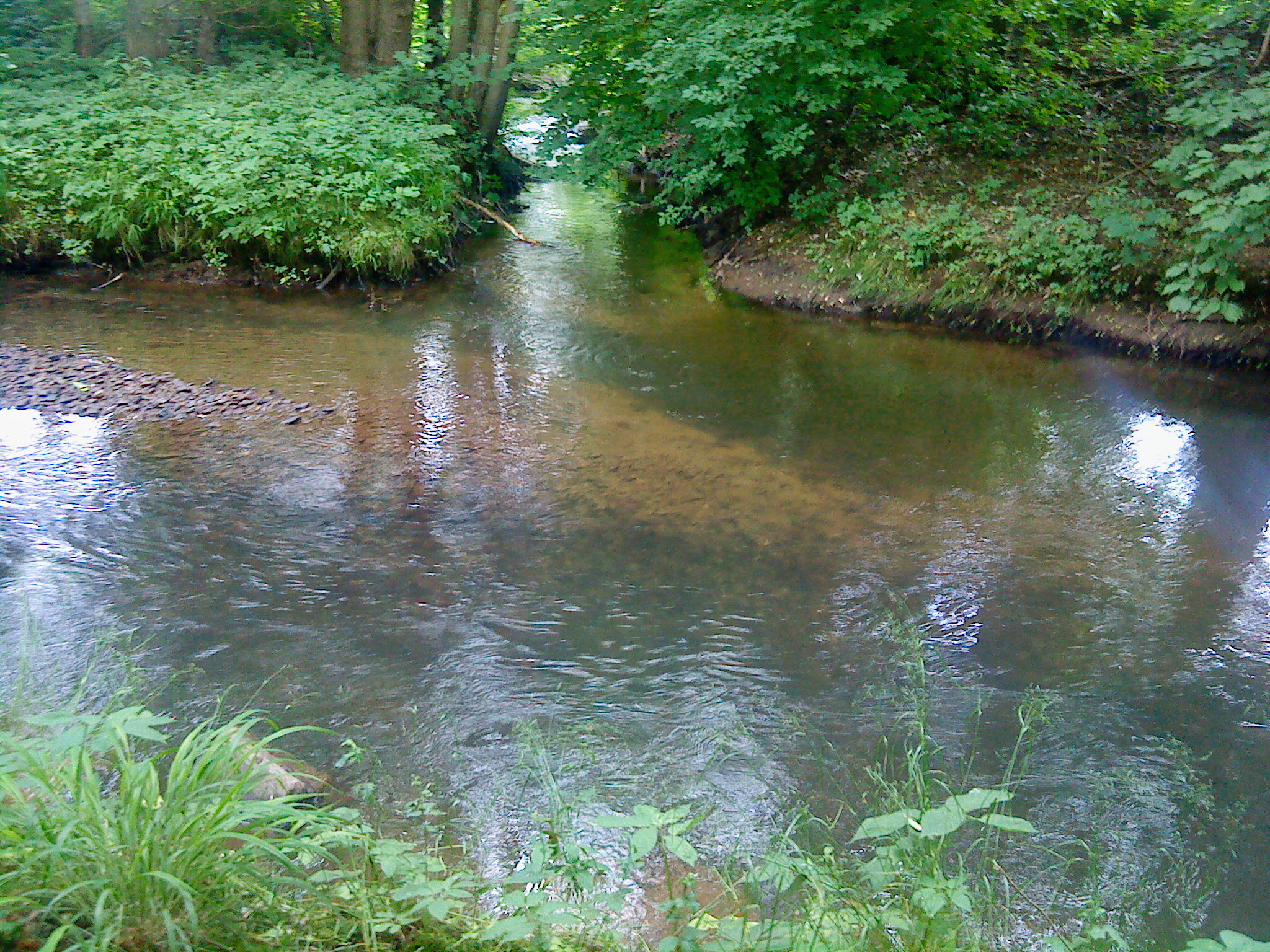 Die Mündung der Sommerkahl in die Kahl bei Schöllkrippen-Langenborn